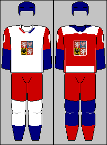 Czech Republic national team jerseys from World Cup of Hockey 2016 ... Big thanks to Realismadder for a large share on these jerseys.